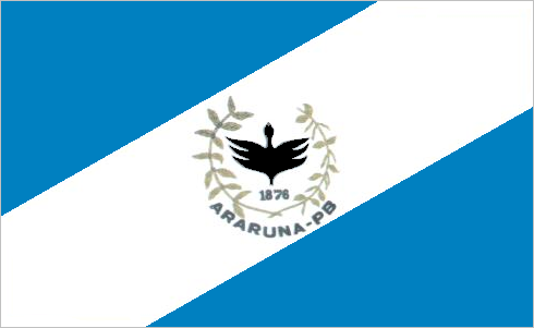 Bandeira do Município de Araruna no estado da Paraíba, Brasil./ Flag of Paraíba's city Araruna, Brazil